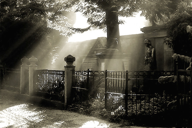 Morgenstimmung auf dem Johannisfriedhof/Osnabrück